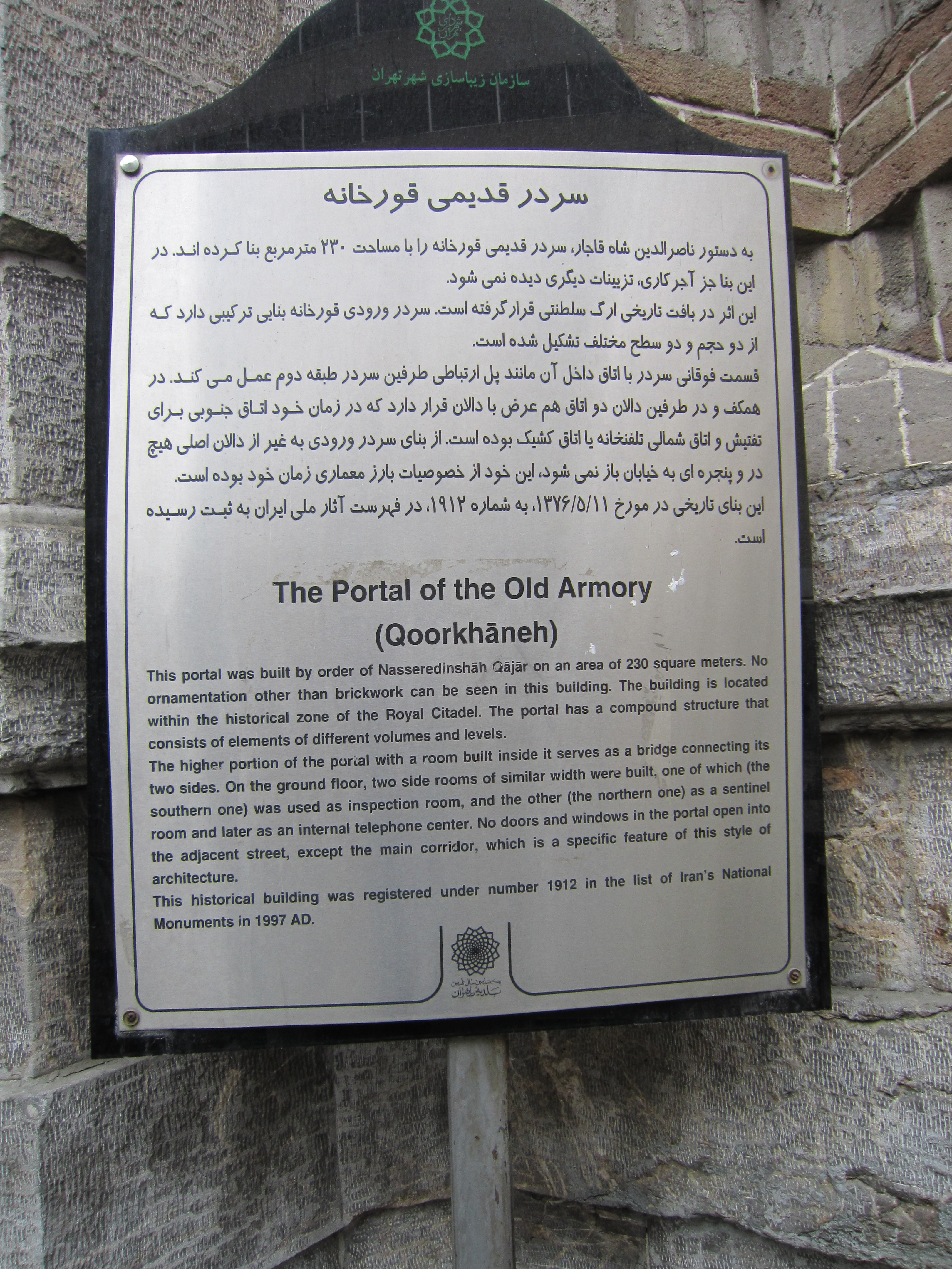 نابلوی اطلاعات قورخانه